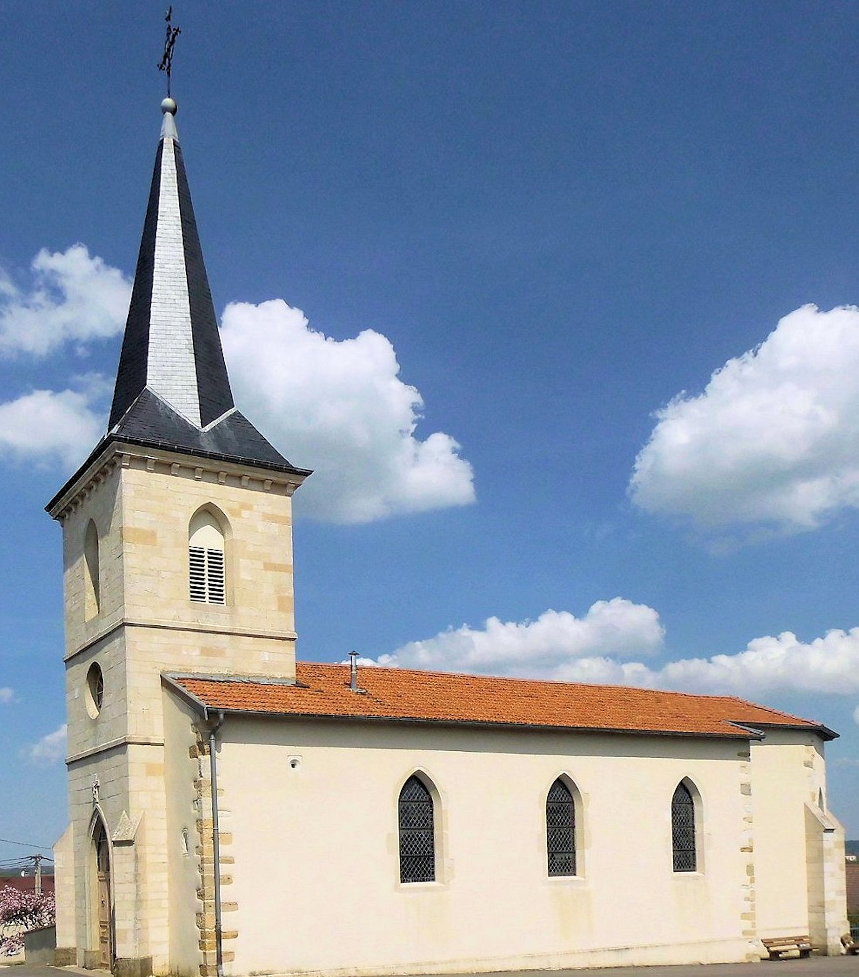 L'église de la Conversion-de-Saint-Paul à Saint-Paul